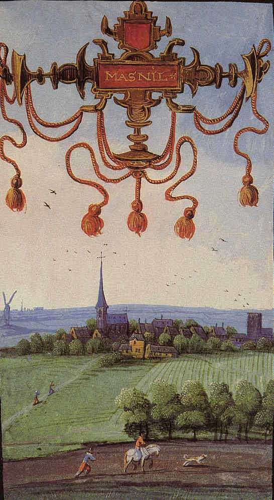 Cartulaire de Croy Masny